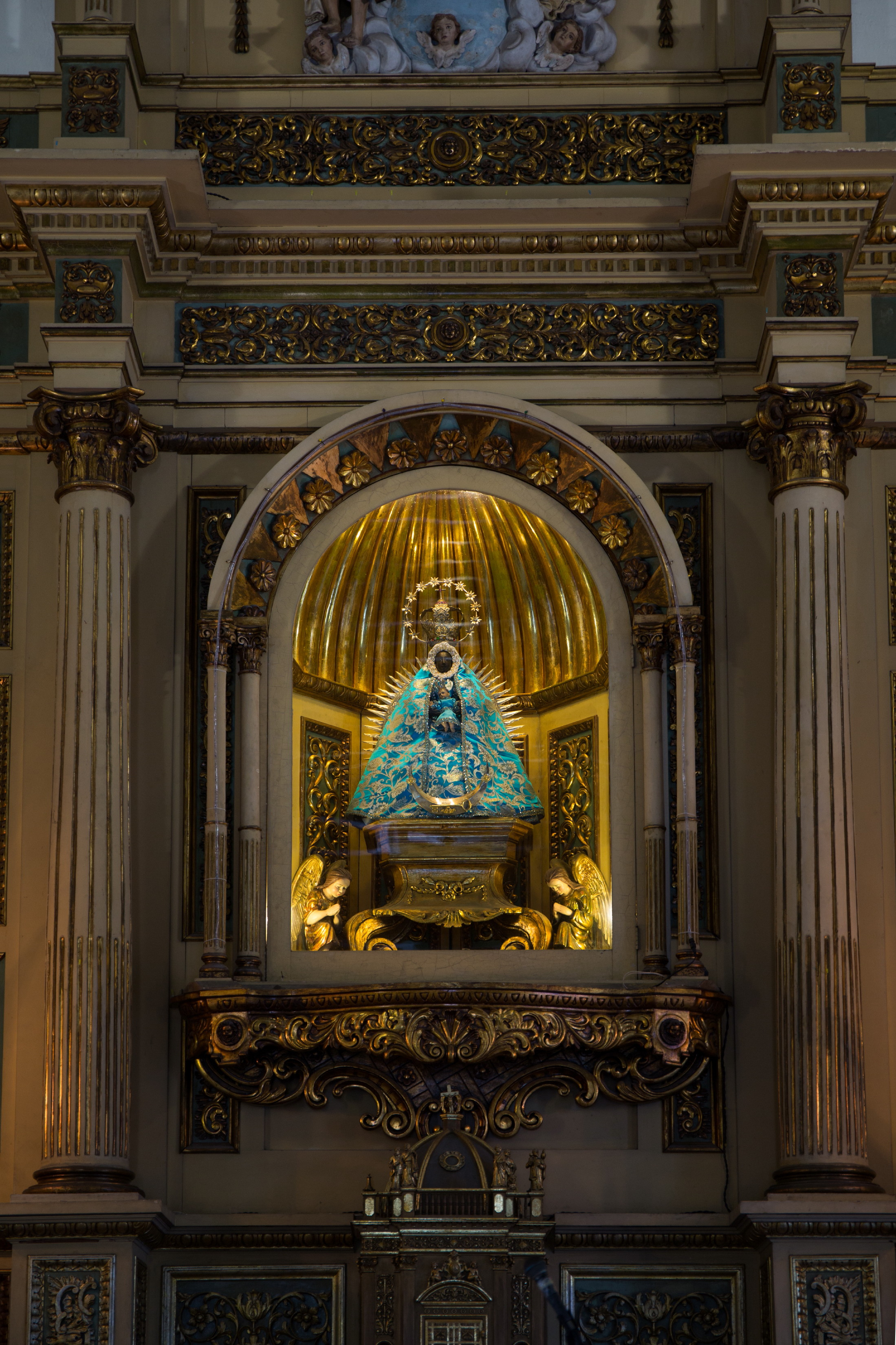 Virgin de Regla im Stadtteil Regla, Havana, Kuba